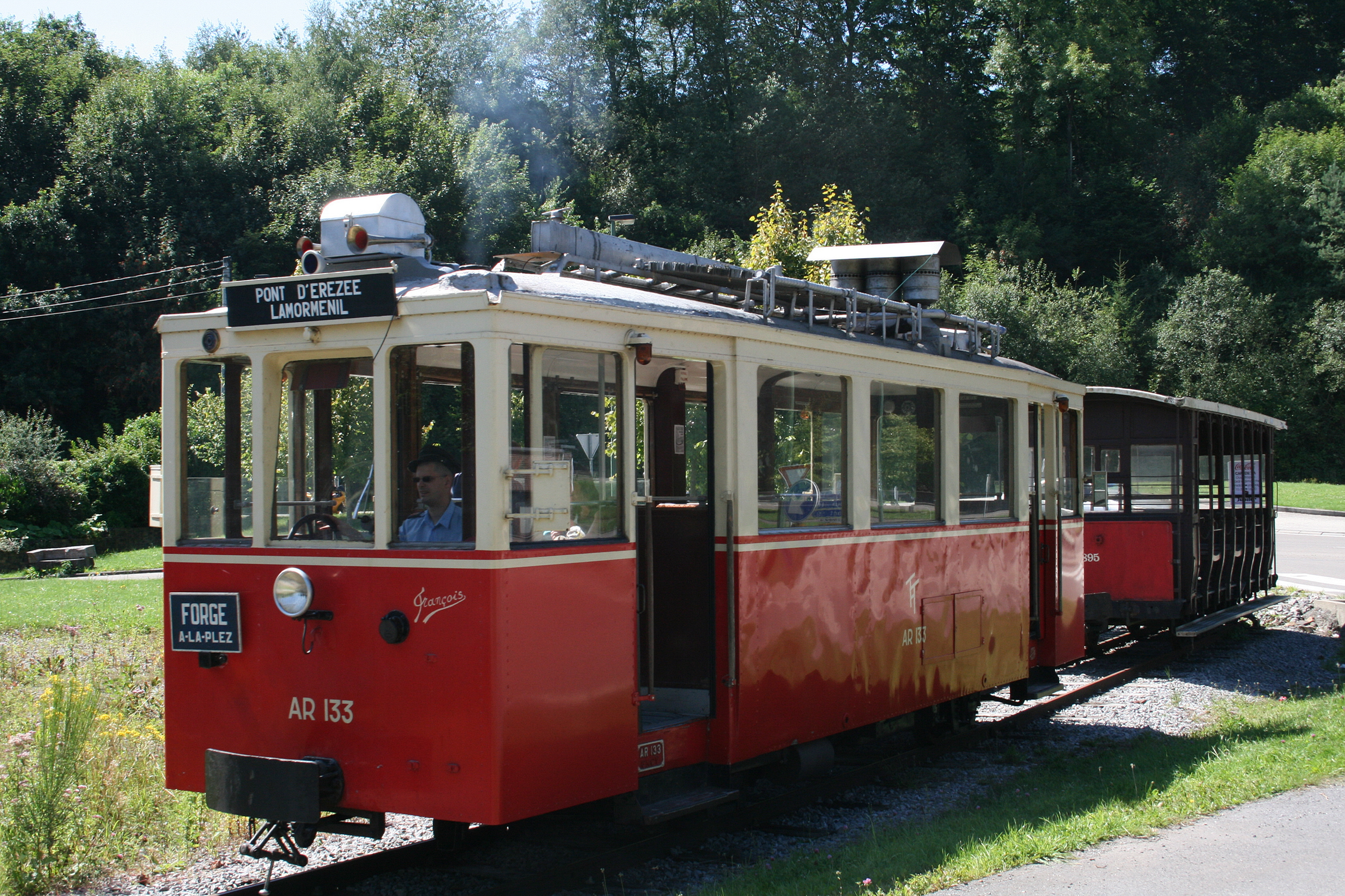 Tramway diesel du type AR 133 - Erezée (Belgique) - Tramway touristique de l'Aisne.